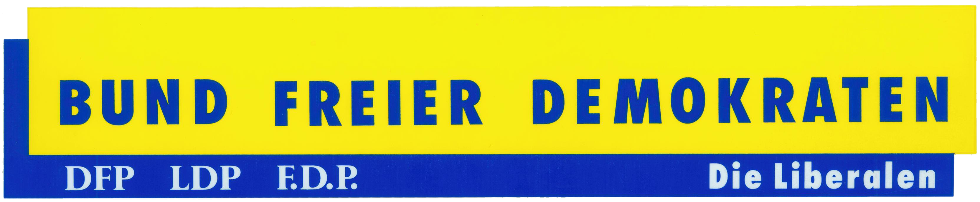 Logo des Bundes Freier Demokraten